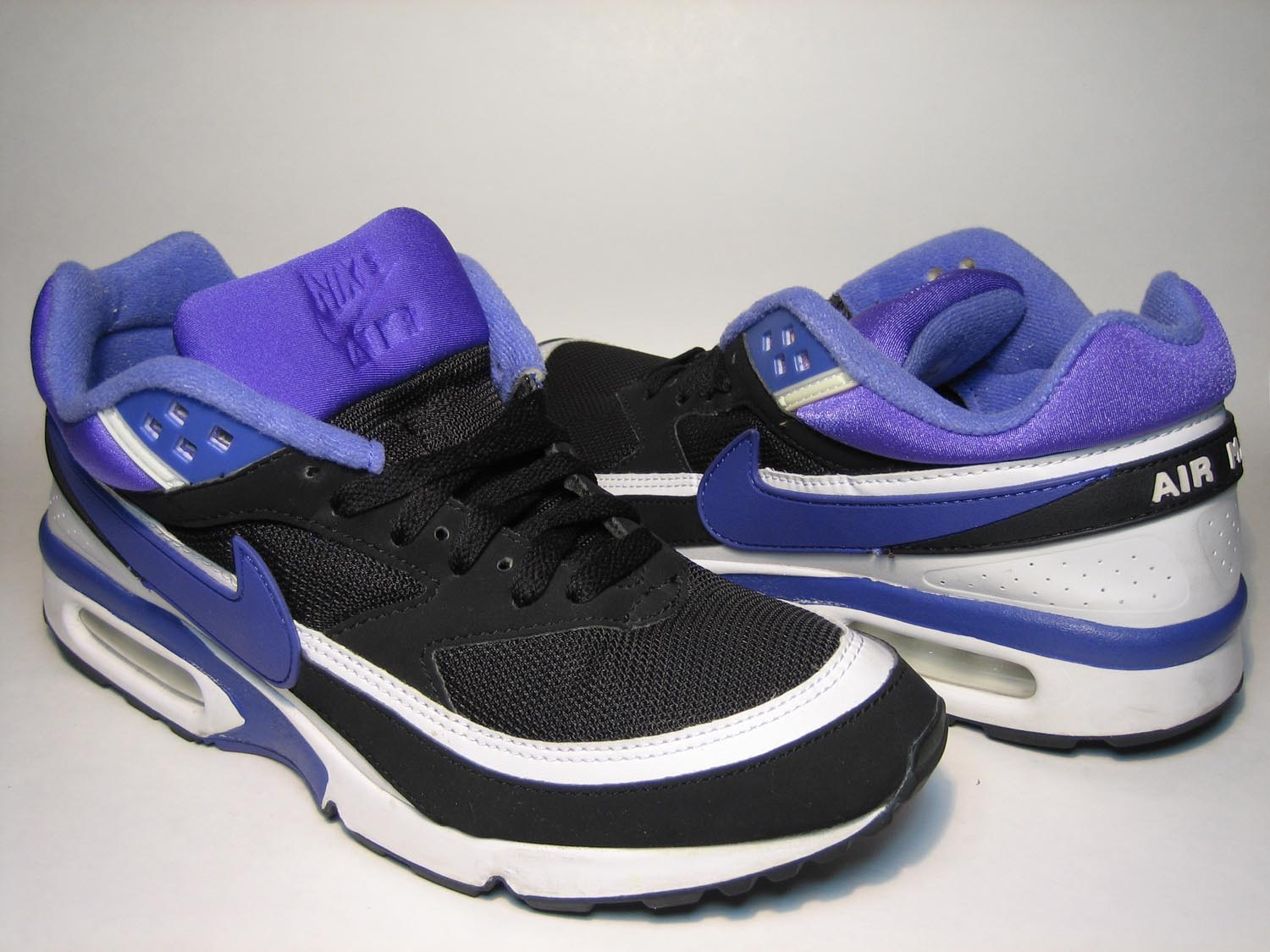 Foto van de eerste Nike air max classic BW